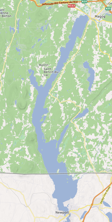 carte réalisée sur umap This map may be incomplete, and may contain errors. Don't rely solely on it for navigation.